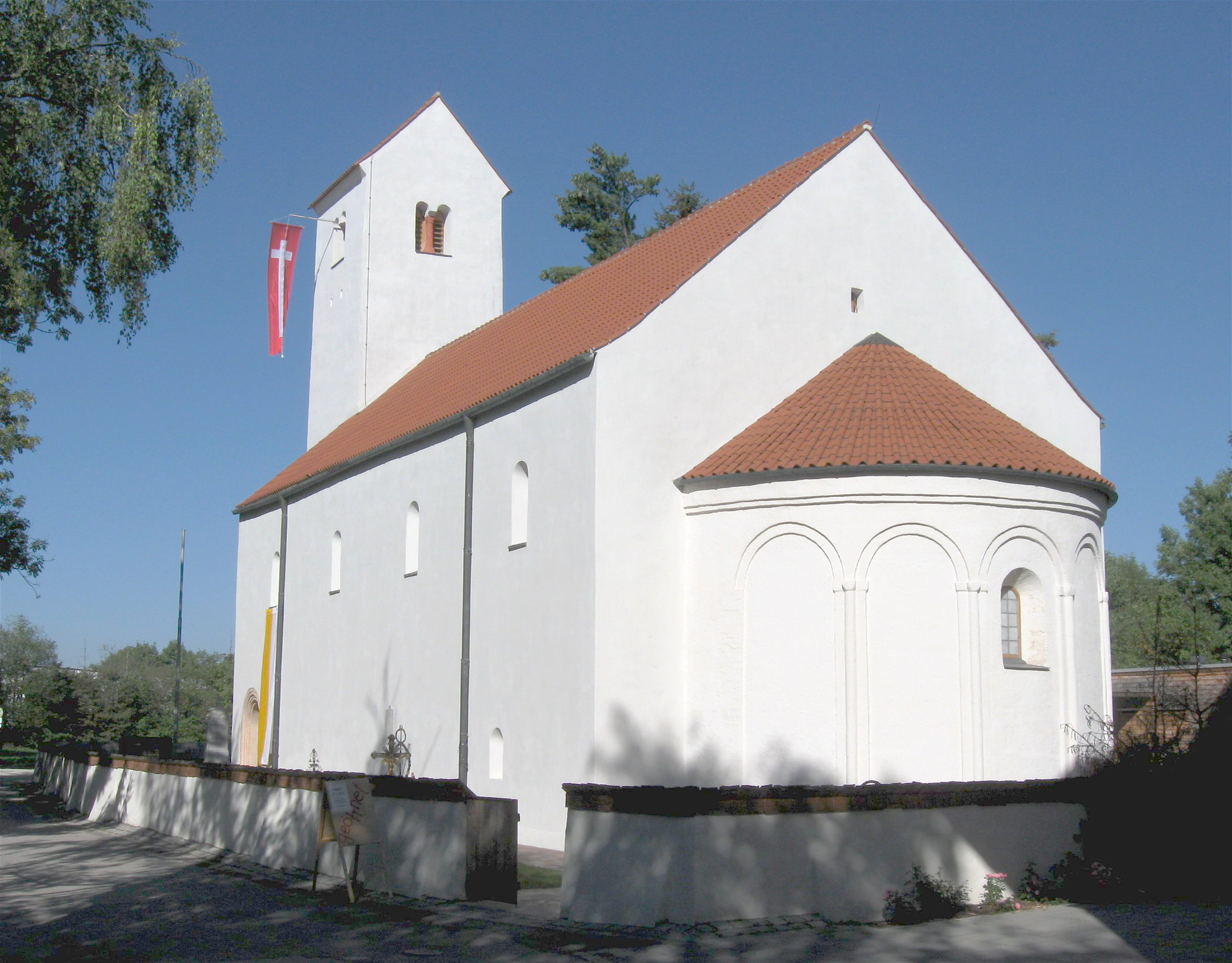 Keferloh; St. Aegidius, Katholische Kirche, romanische Anlage, geweiht im Jahr 1173.